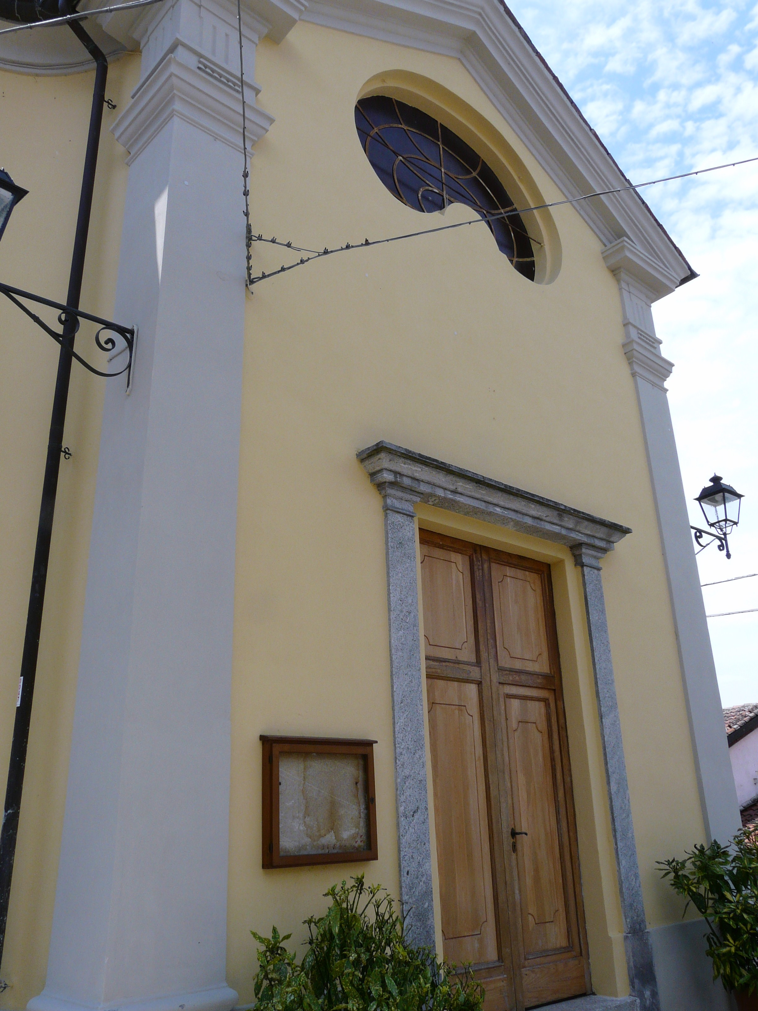 Chiesa dei Santi Cosma e Damiano, Volpeglino, Piemonte, Italia